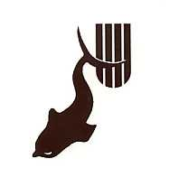 Escut de la Institució de les Lletres Catalanes d'època republicana